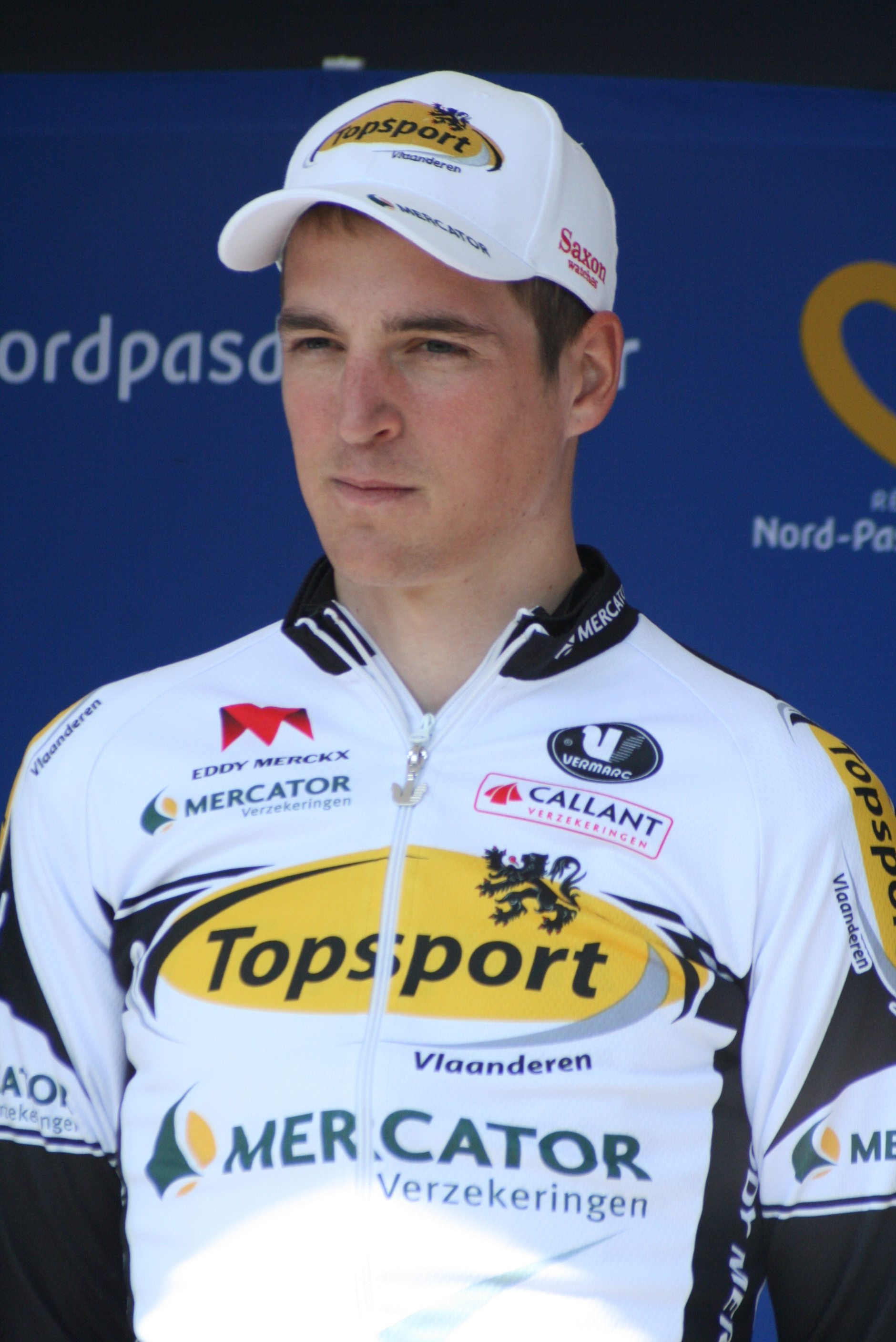 Présentation des coureurs au départ de la première étape Jarl Salomein